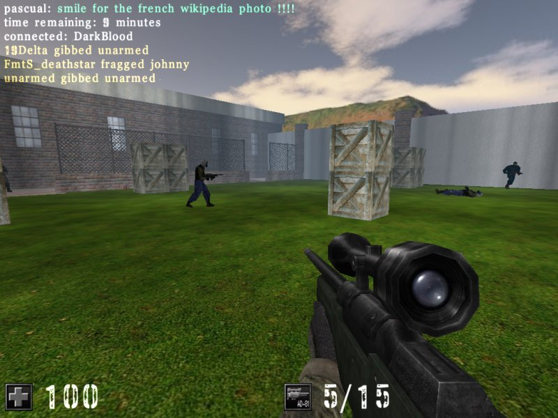 Capture d'écran du jeu ActionCube, map "ac_aim"